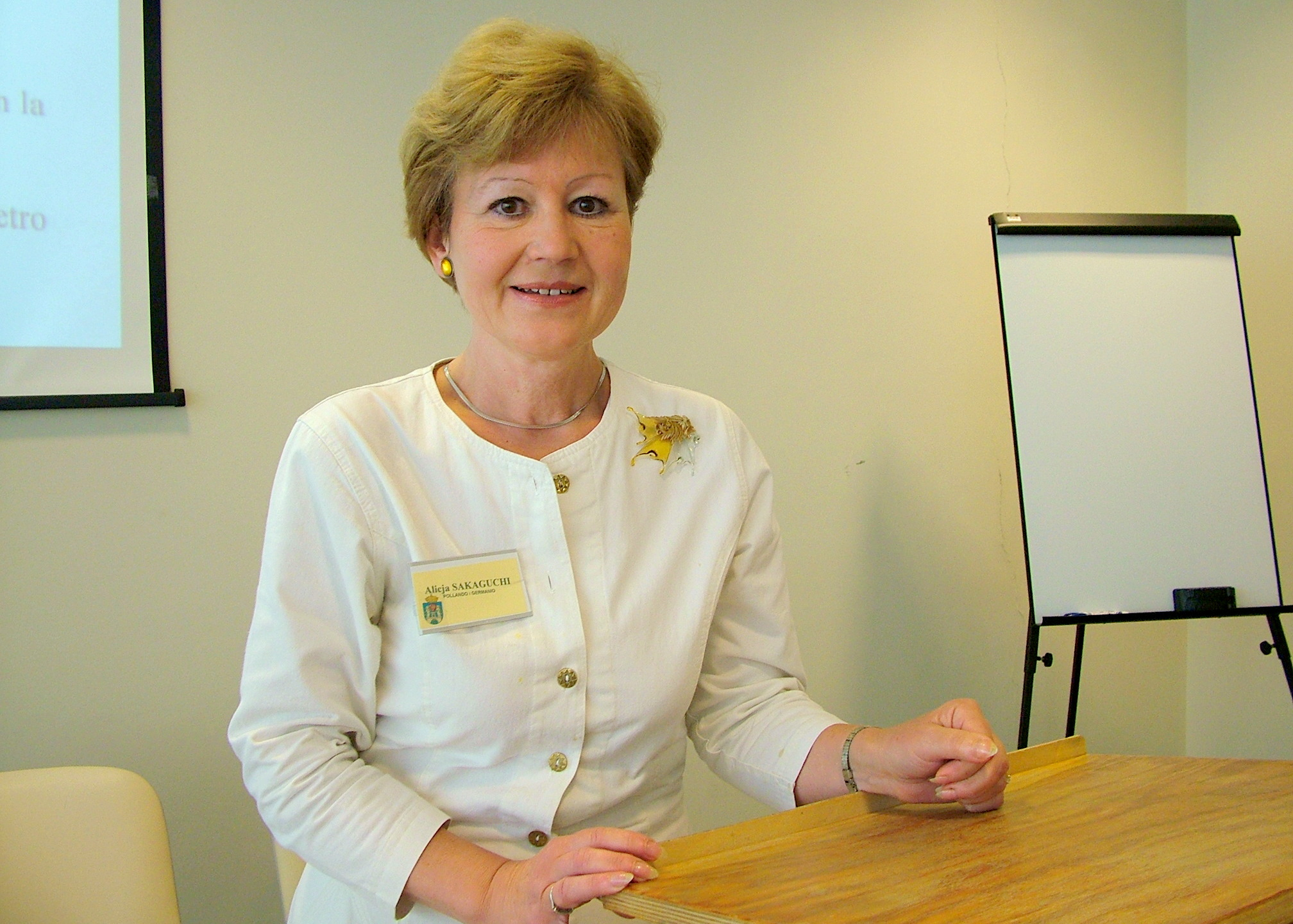 Alicja Sakaguchi, UAM Poznan